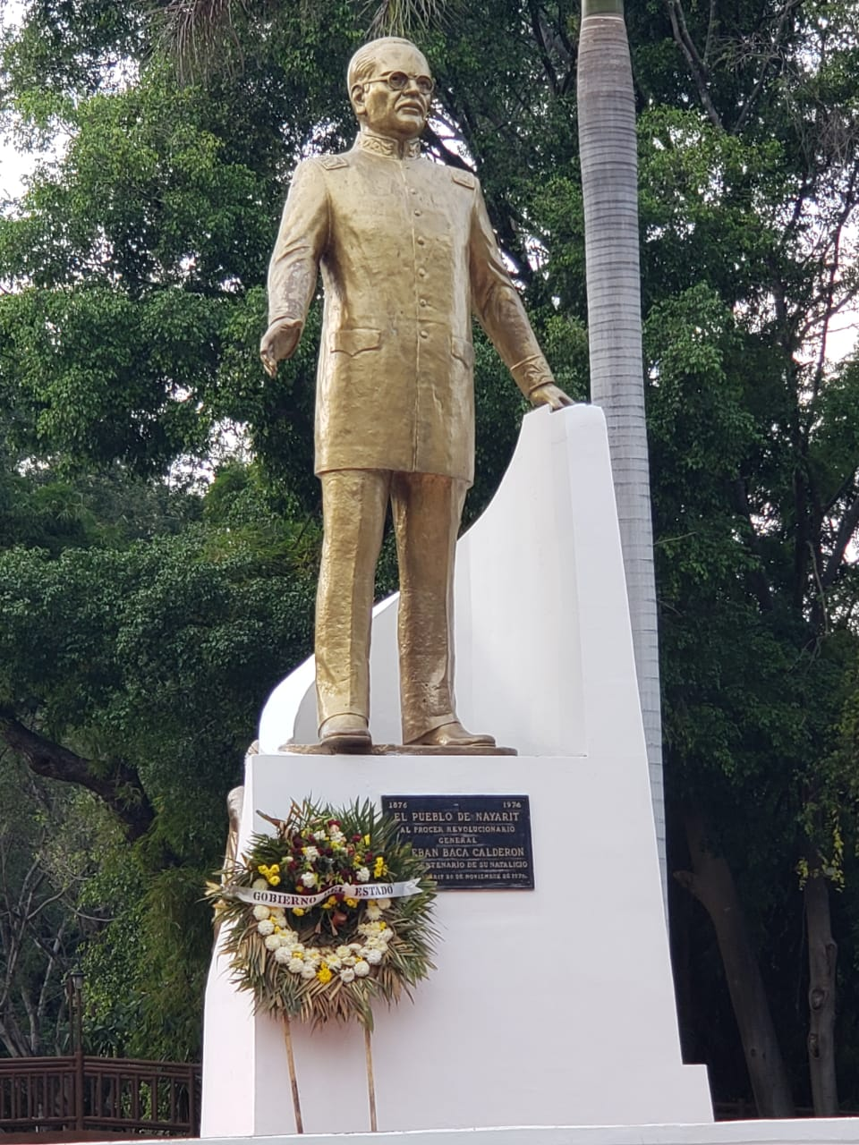 estatua de esteban baca calderon